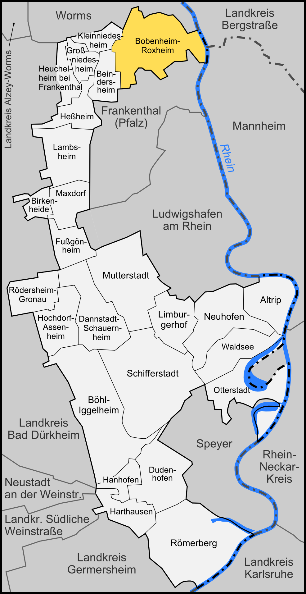 Karte der Gemeinde Bobenheim-Roxheim im Rhein-Pfalz-Kreis